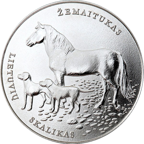 1,50 euro coin